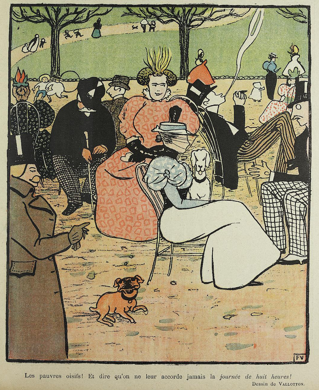 Caricature in Le Rire n°77